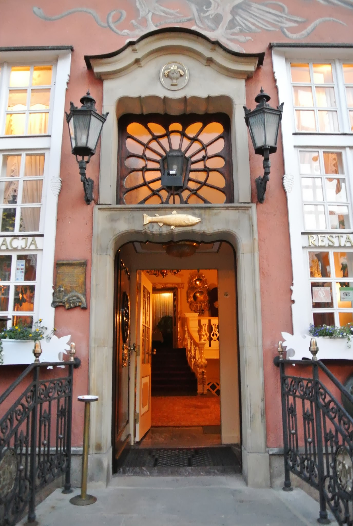 Gdańsk Główne Miasto - kamienica w zespole dawnej wytwórni likierów przy ulicy Szerokiej 51 (portal Kamienicy Pod Łososiem).